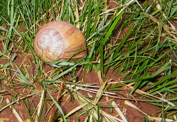 Weinbergschnecke (Helix pomatia) im Grünlandbereich des Naturschutzgebiets Satzer Moor, Bad Driburg, Deutschland.